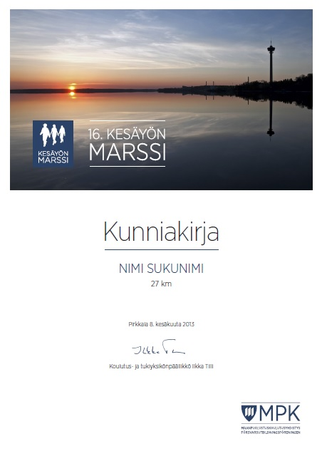 Kesäyön marssin uusi kunniakirja